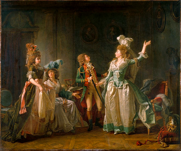 Michel Garnier (1753–1829): Der Abschied des Dragoners (Le départ du dragon). Öl auf Leinwand, 55 x 65 cm. Musée Carnavalet, Paris.